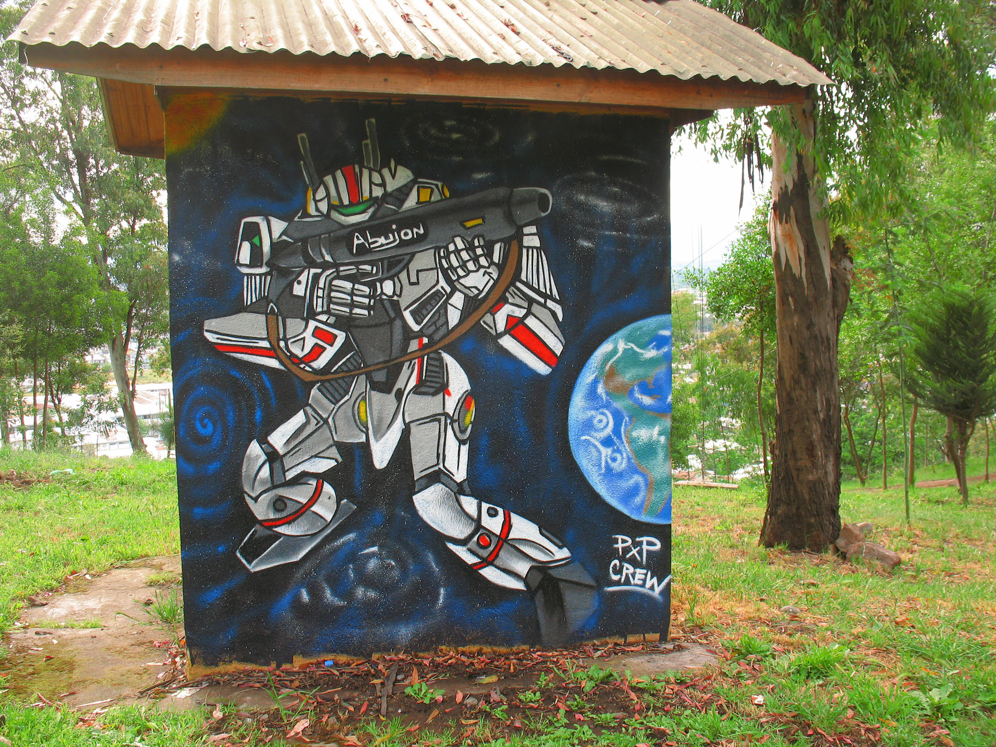 Robotech